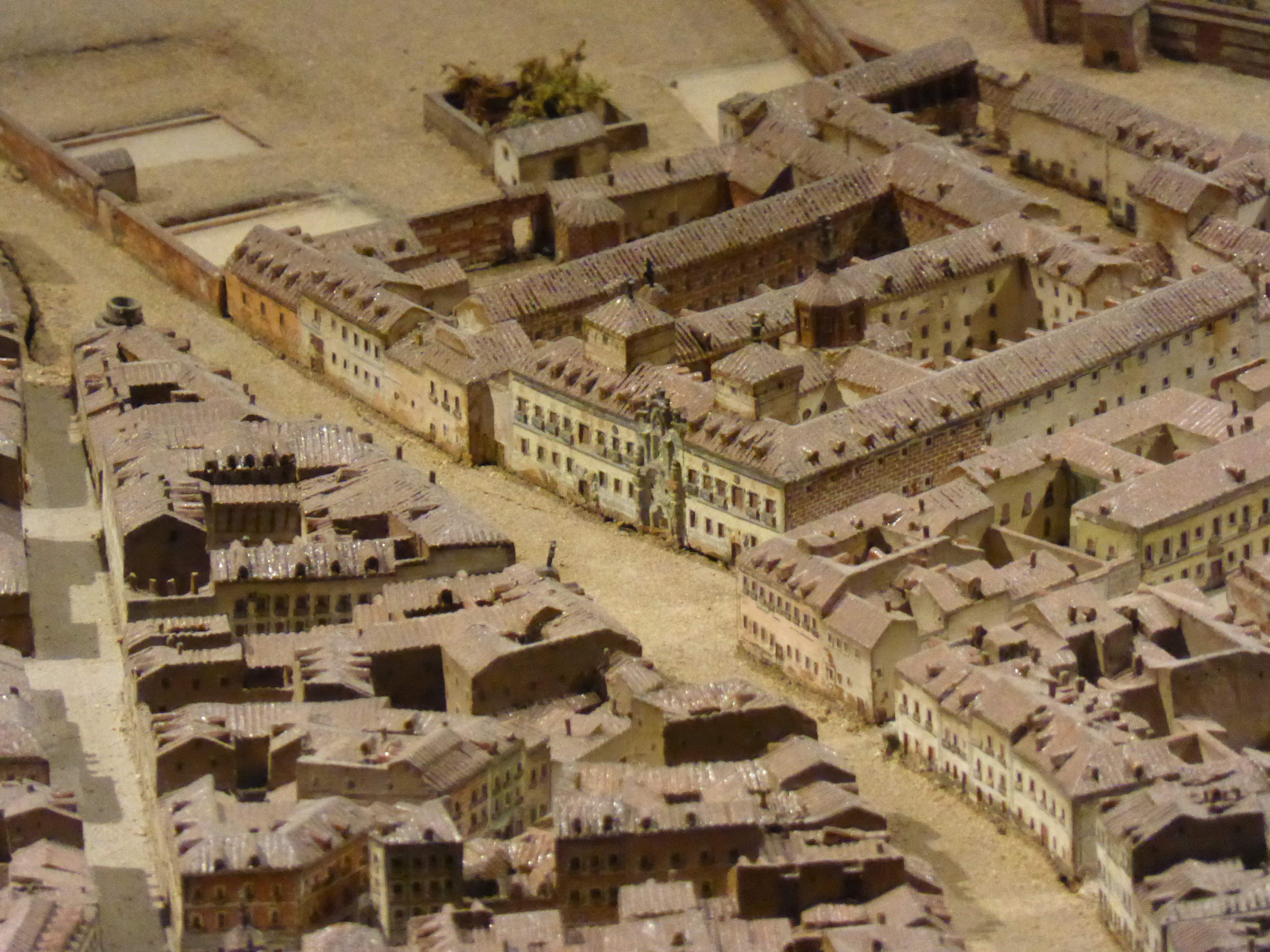 En el Museo de Historia de Madrid se conserva una gran maqueta llamada "Modelo de Madrid", construida por el ingeniero militar León Gil de Palacio, entre los años 1828 y 1830. En este detalle vemos en diagonal parte de la calle Fuencarral, con la gran manzana del Hospicio de Madrid (Real Hospicio del Ave María y San Fernando), del cual solamente se conserva la crujía de la fachada principal y la capilla. El inmueble actualmente es sede del Museo de Historia de Madrid (o Museo Municipal).